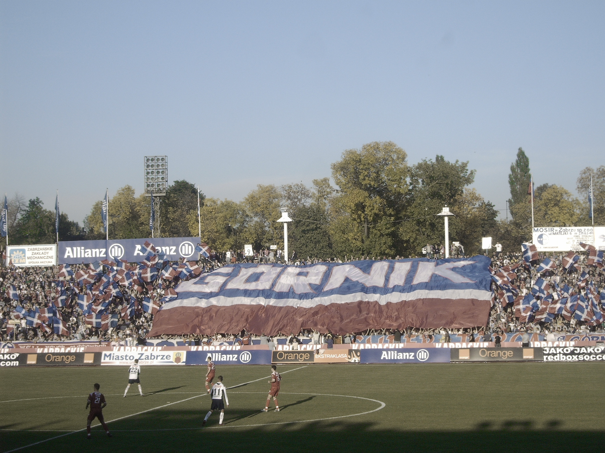 Fanchoreographie im Zabrzer Ernest-Pol-Stadion